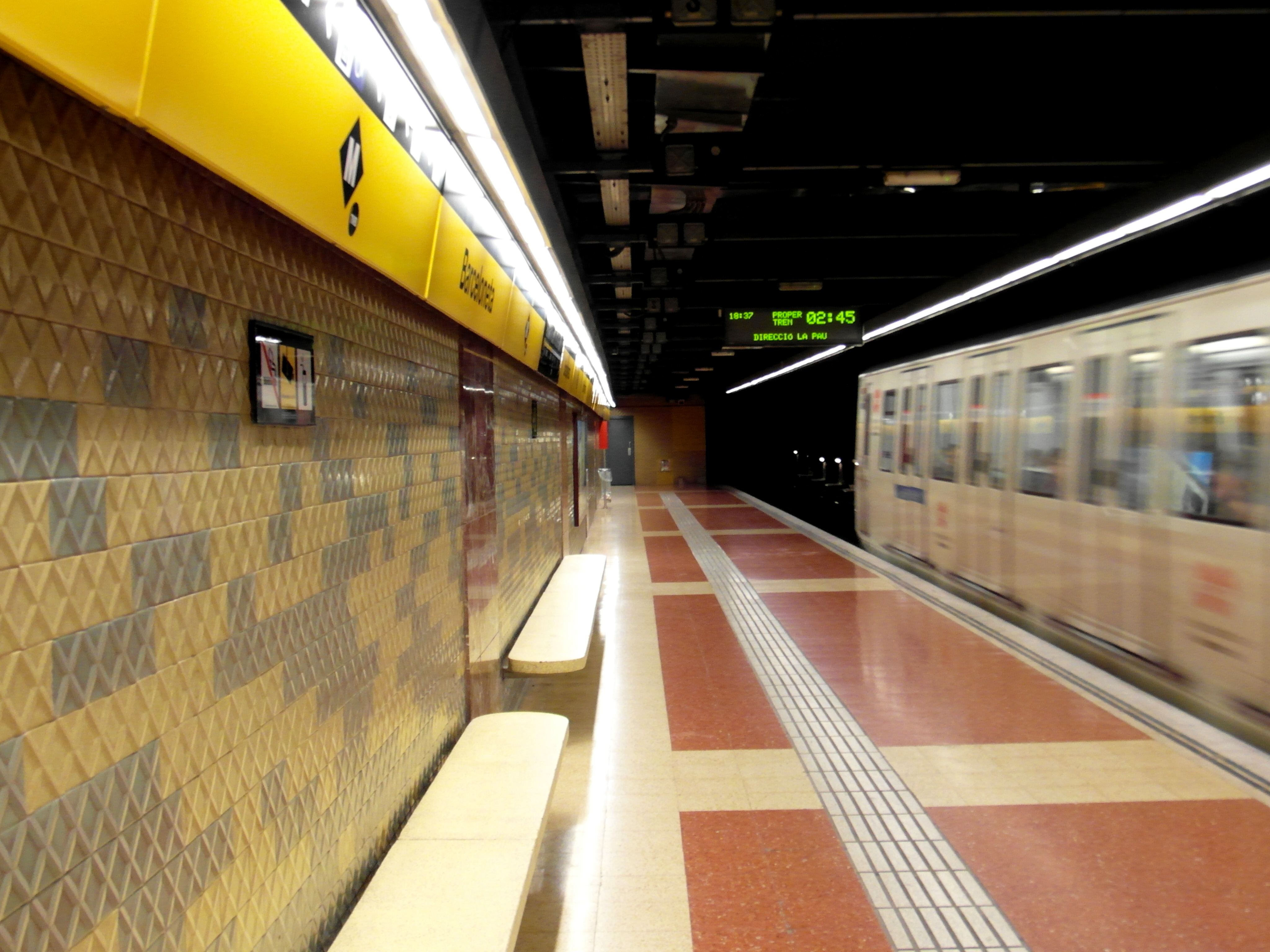 Barcelona - Metro - Estació de Barceloneta